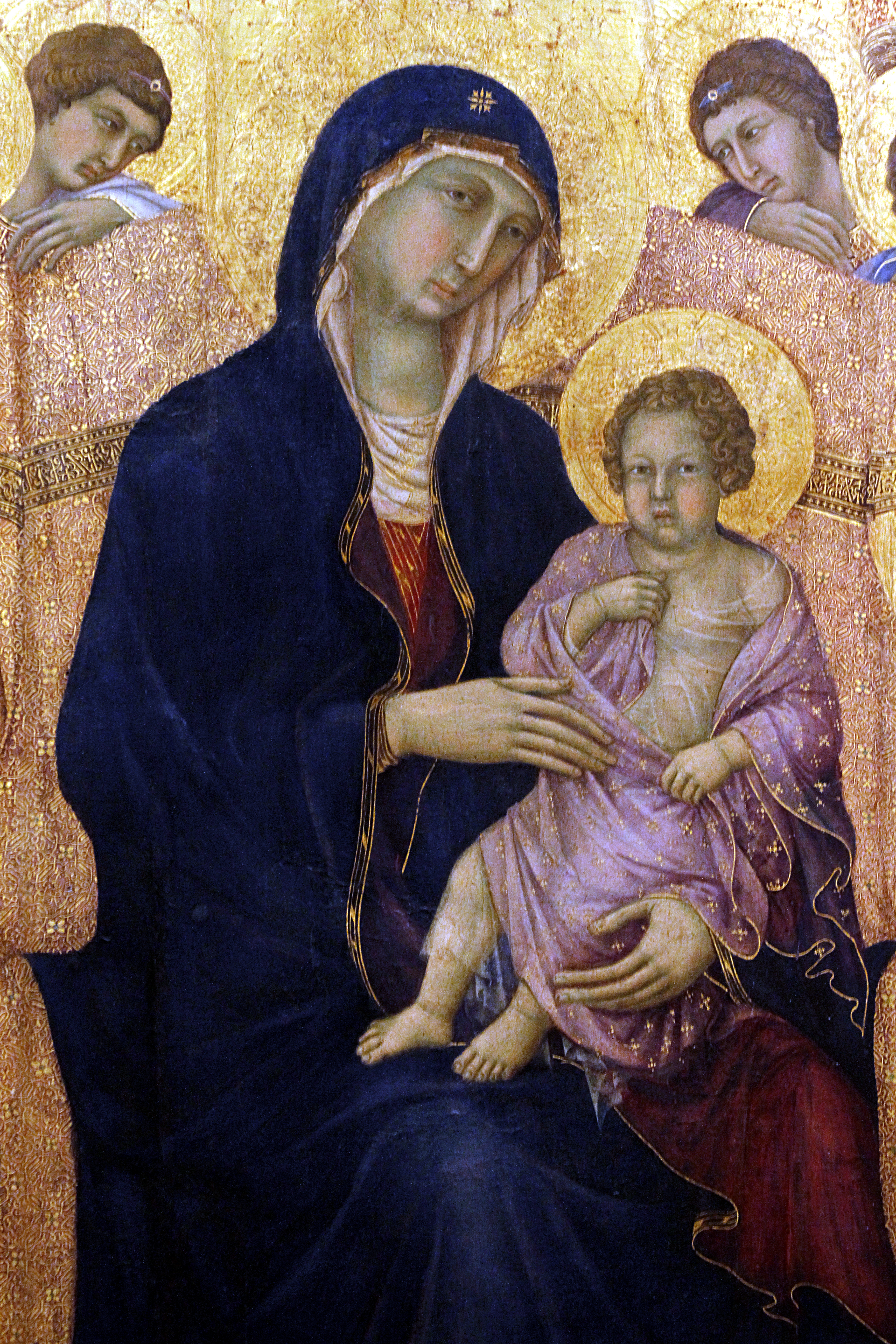 Maestà - Museo dell'Opera del Duomo - Siena